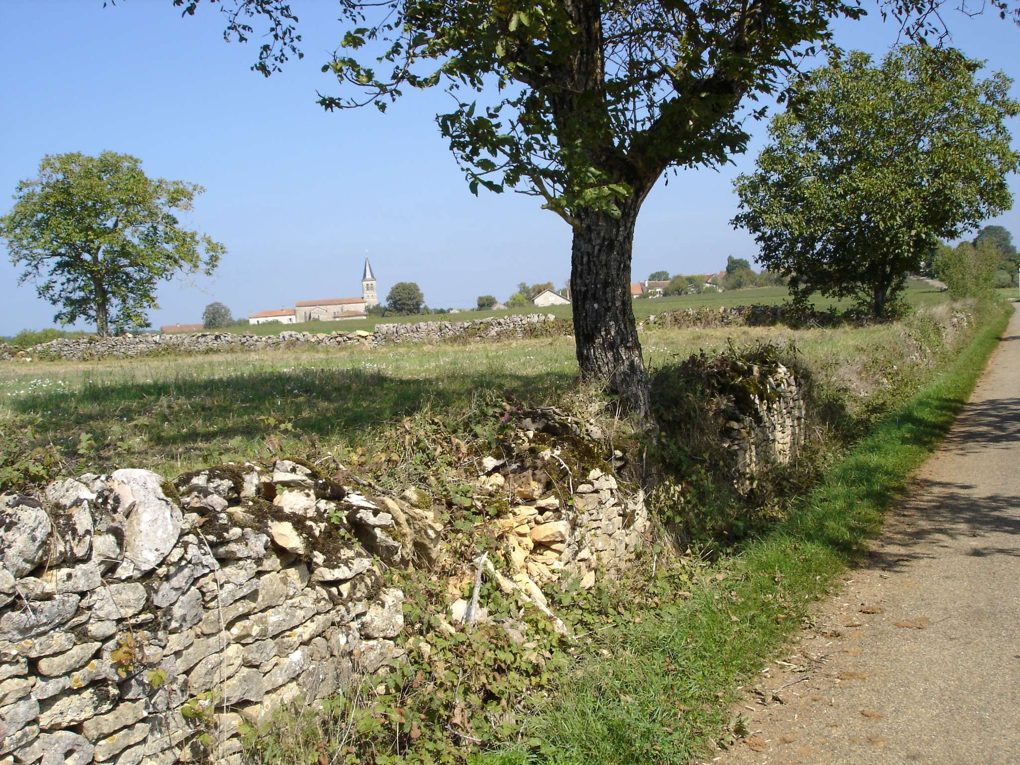 Le village de Beauregard (Lot) -- Photo amateur prise par moi-même